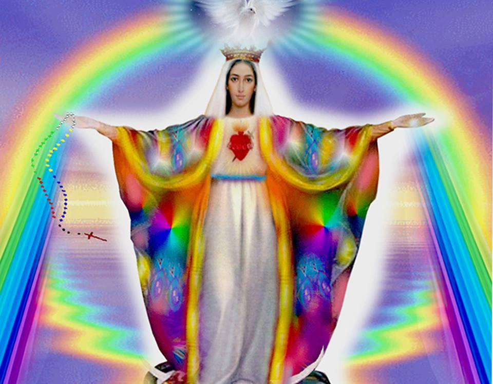 Advocación Nuestra Señora de los Colores